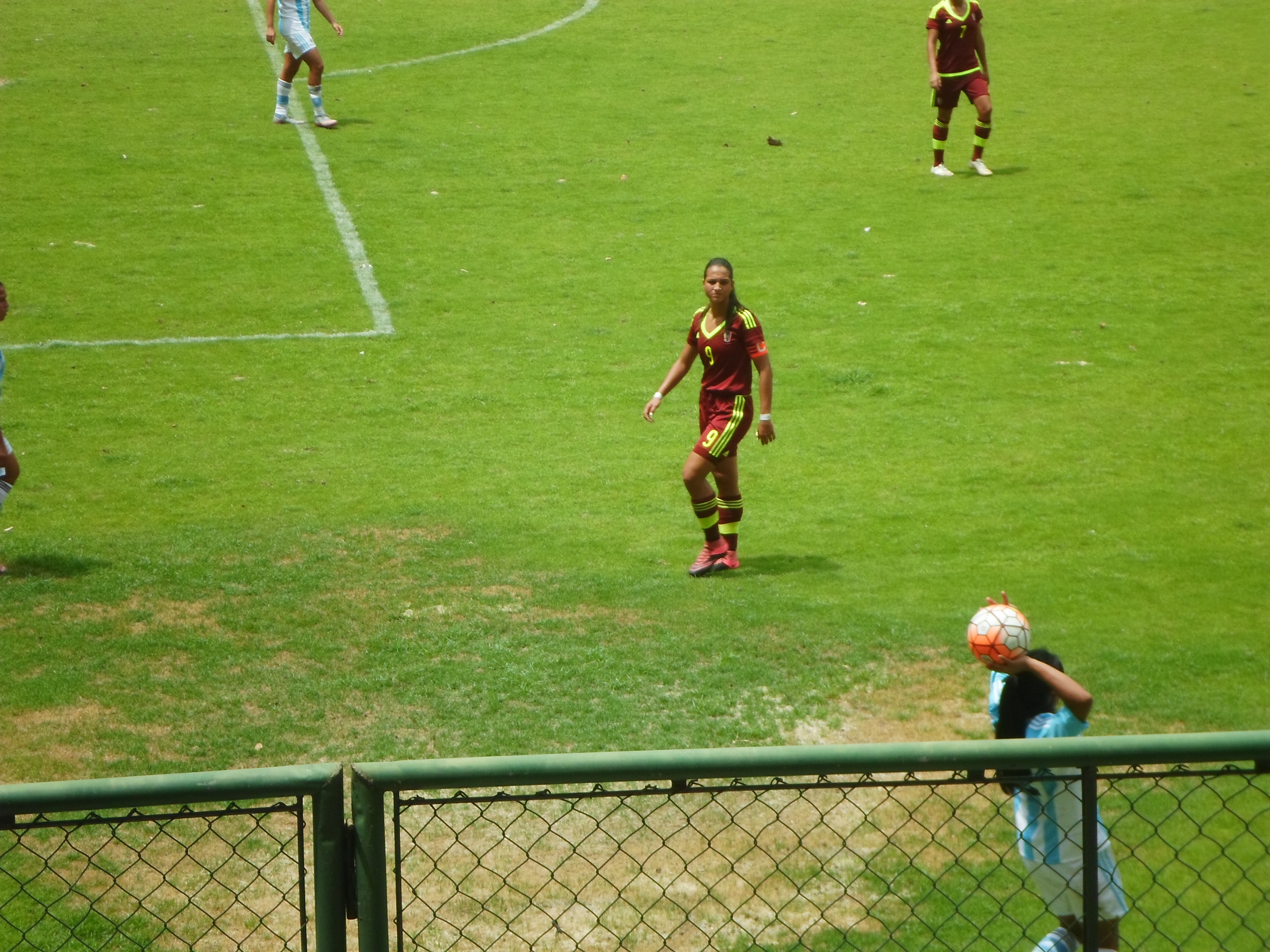 Deyna la capitana Vinotinto